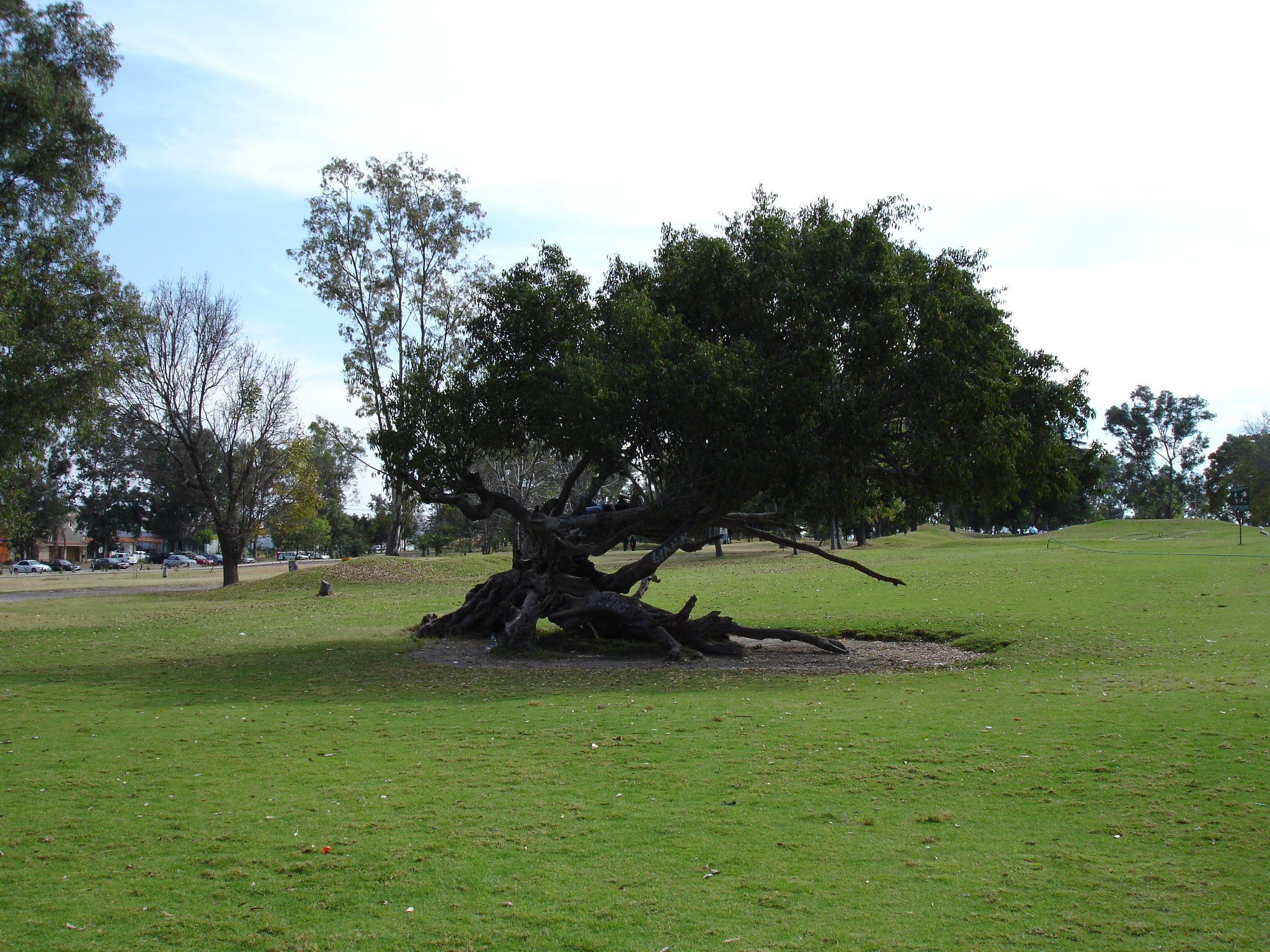 Arbolito del parque metropolitano de Guadalajara